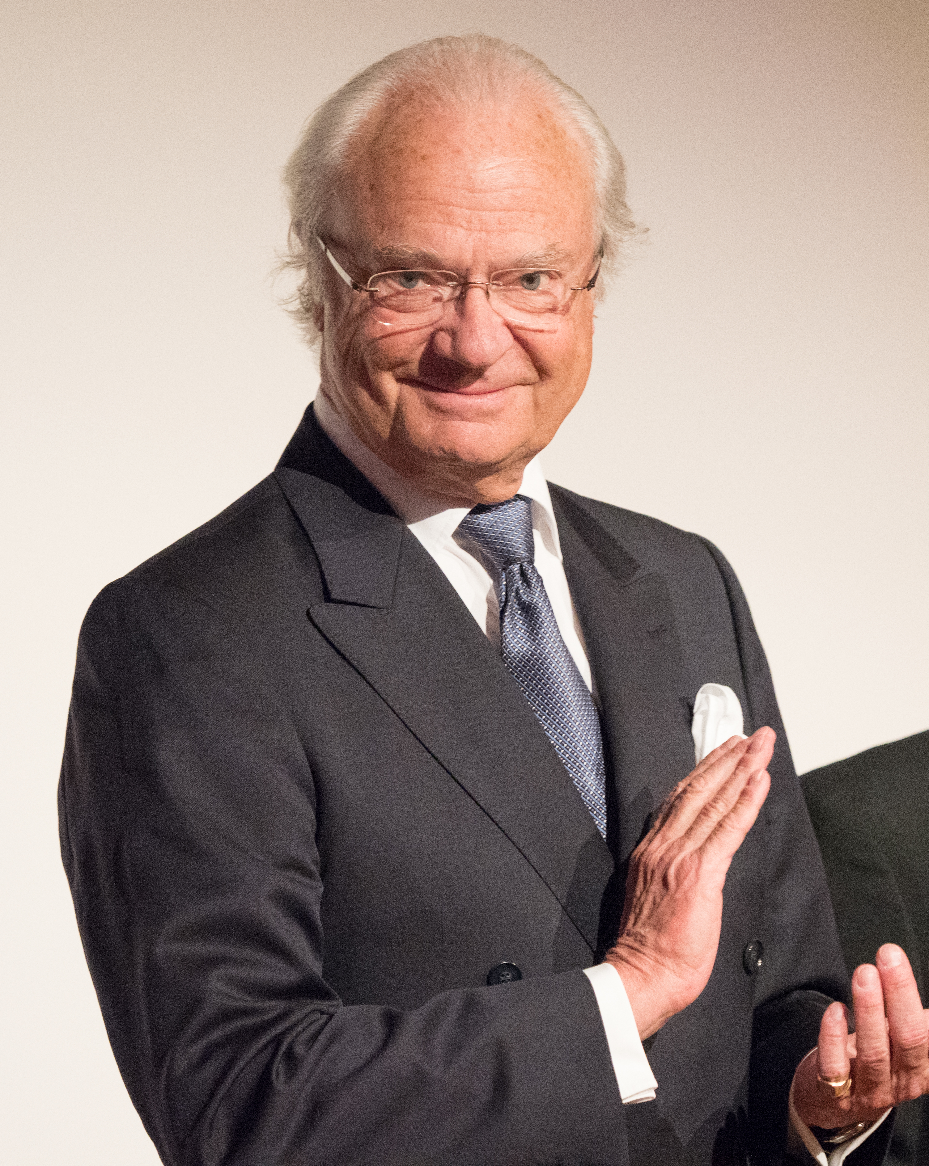 Crafoord Prize 2018, Geosciences, Kungliga Vetenskapsakademien, Syukuro Manabe and Susan Solomon